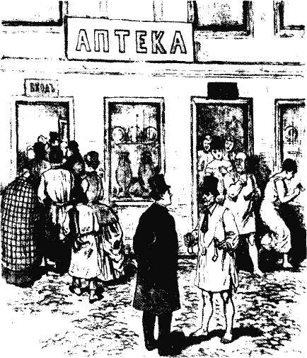 Порфирьев Аптекарская такса. 1885 г.